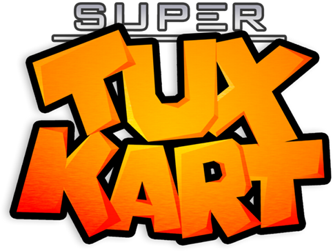 Logo de SuperTuxKart.